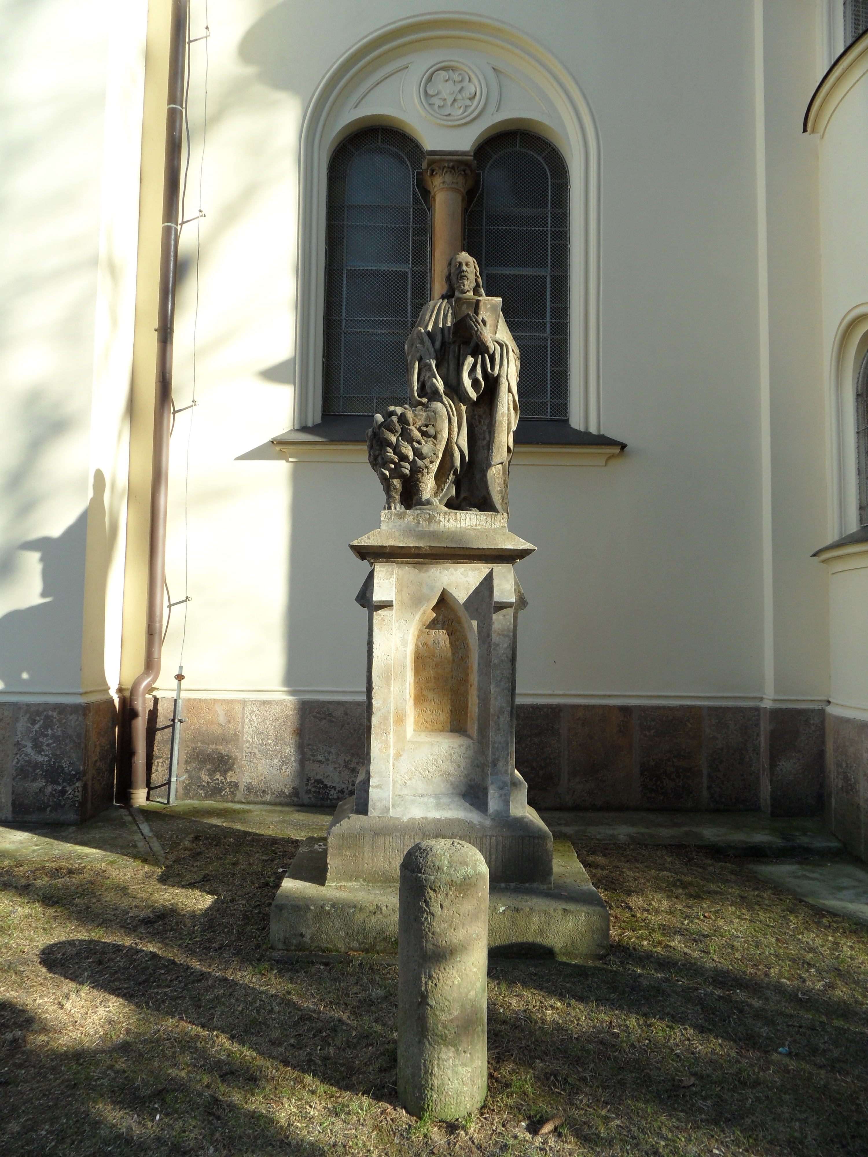 Kaple Panny Marie na Rožmberku